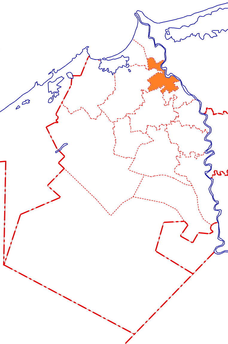 خريطة مركز المحمودية بالنسبة لمحافظة البحيرة، مصر.